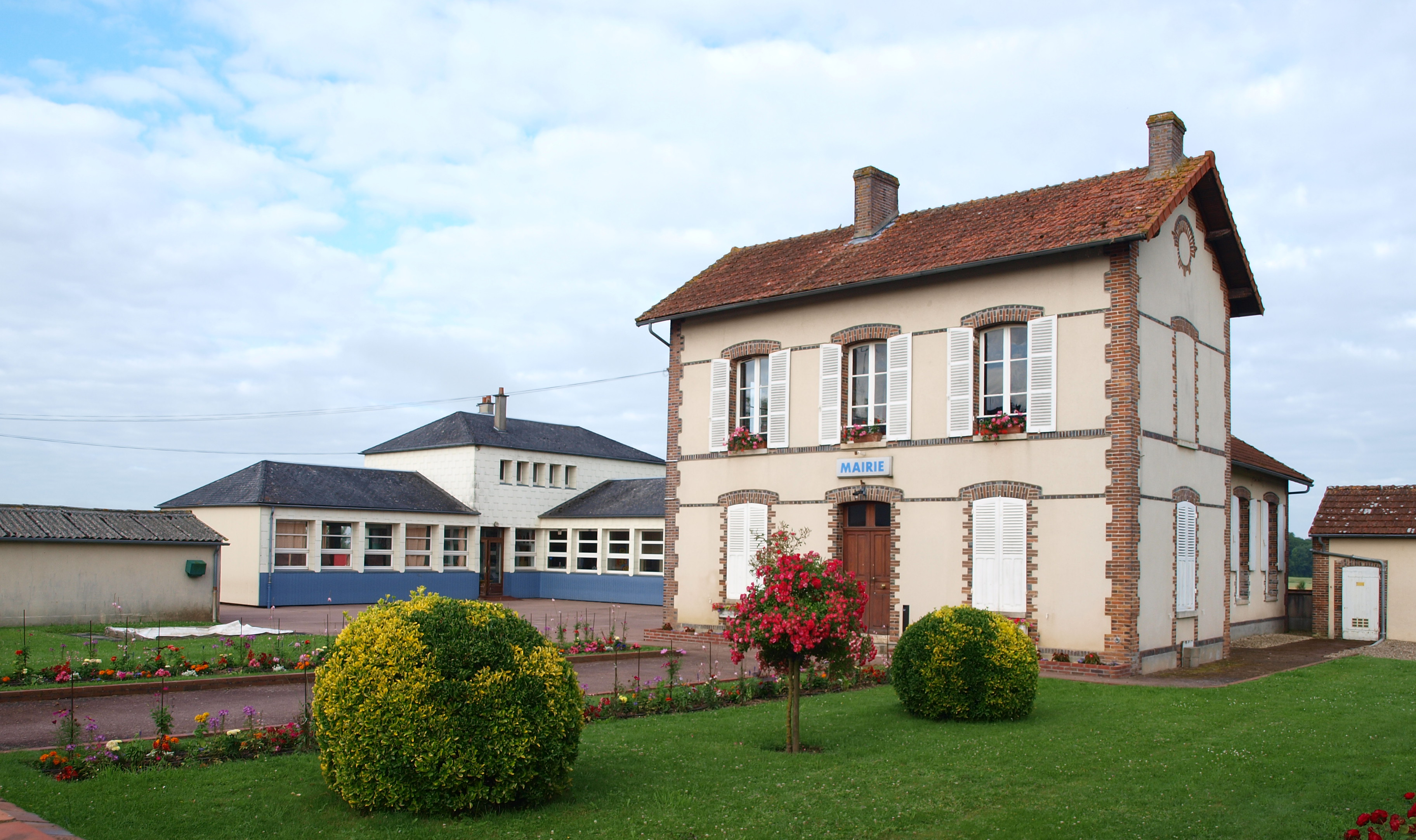 Ervauville (Loiret, France) ; mairie & groupe scolaire.